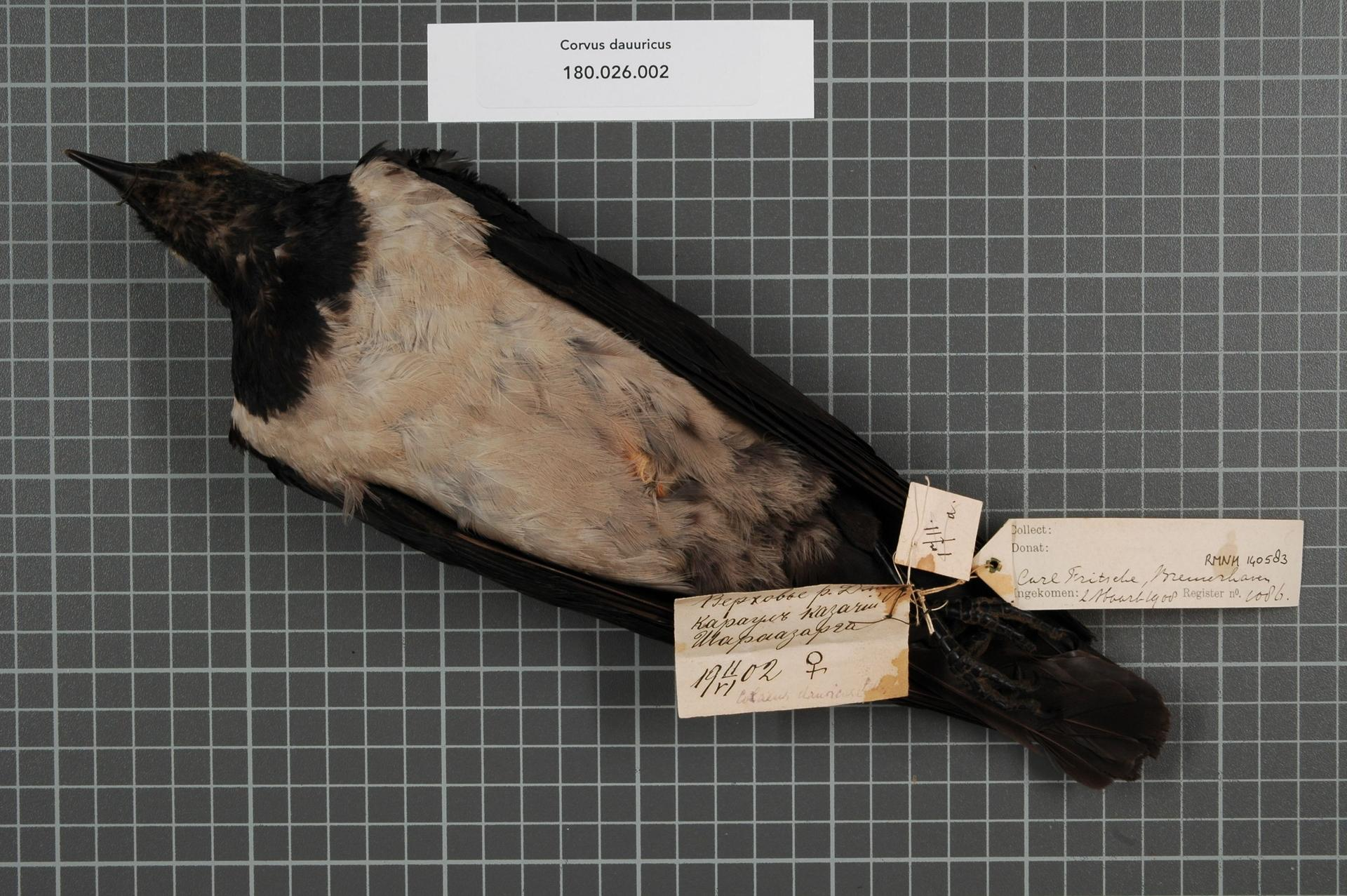 Corvus dauuricus Pallas, 1776